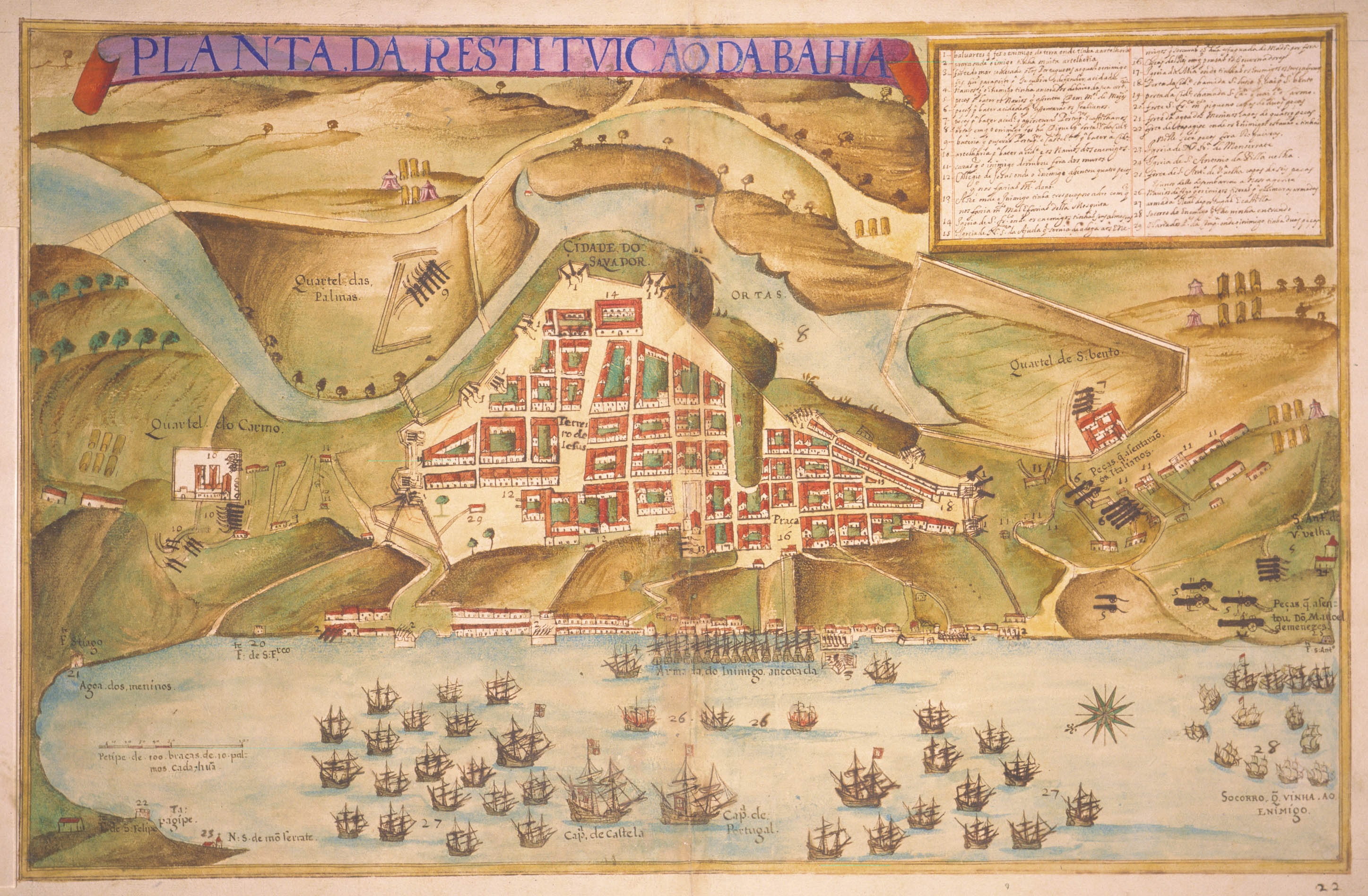 représentation de la prise de Salvador de bahia par l'armée hispano-portugaise